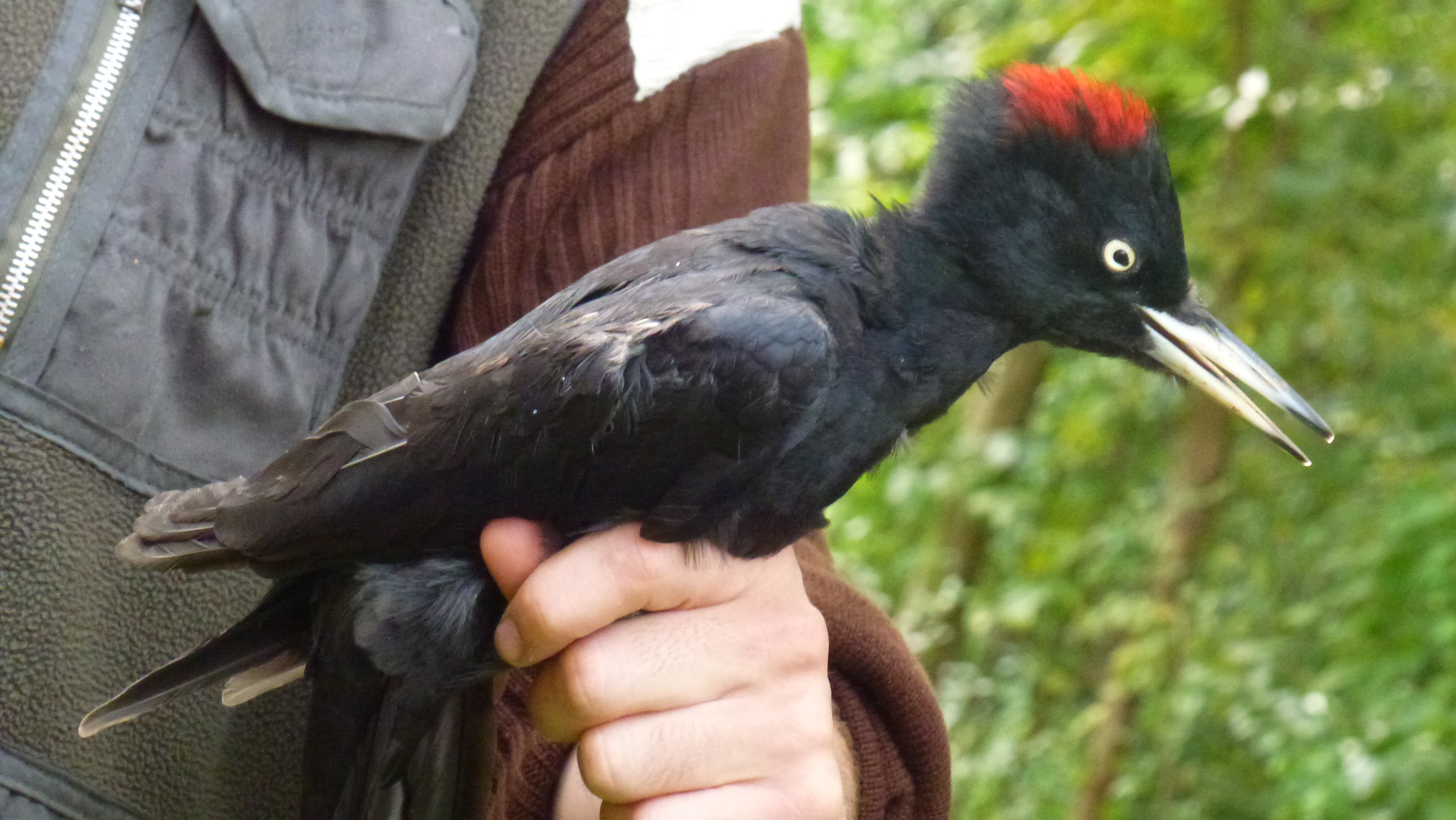 Prise à Ócsa, Hongrie